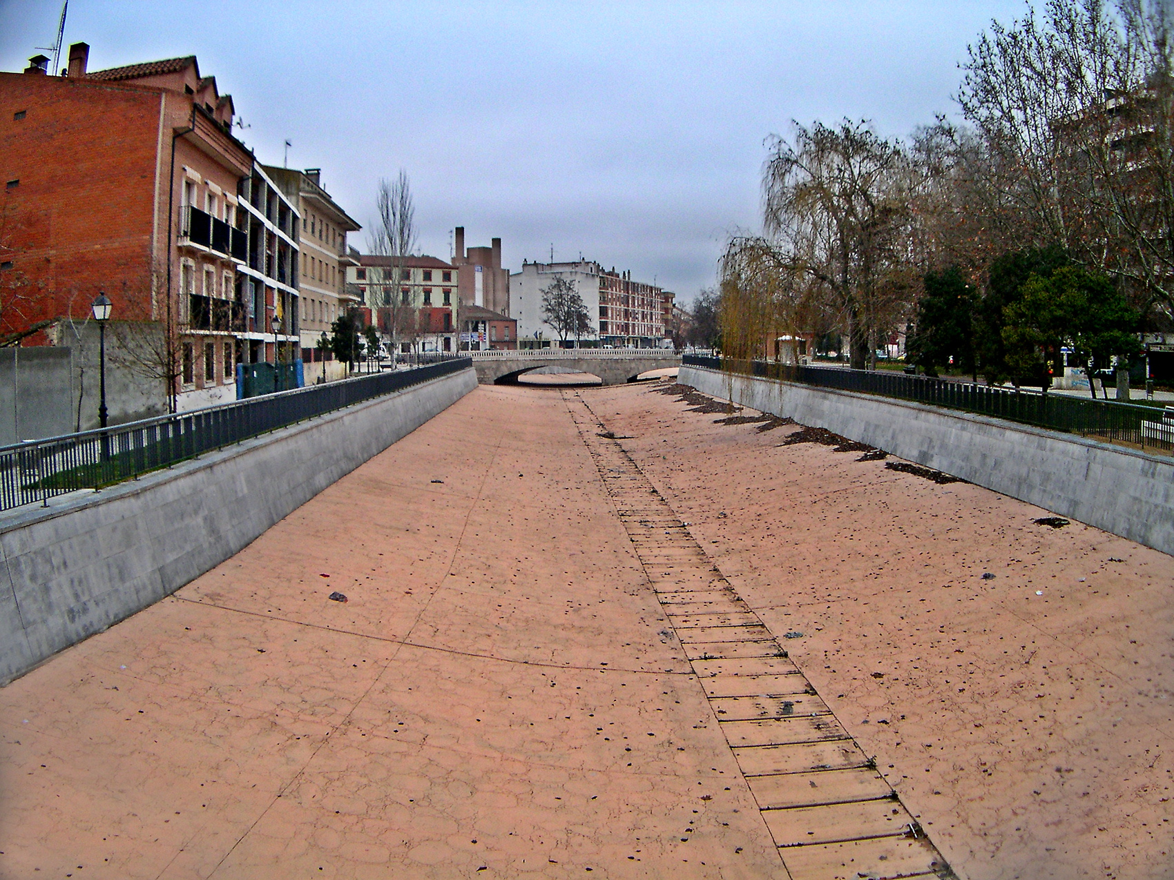 El río Zapardiel a su paso por Medina del Campo (Provincia de Valladolid, España)